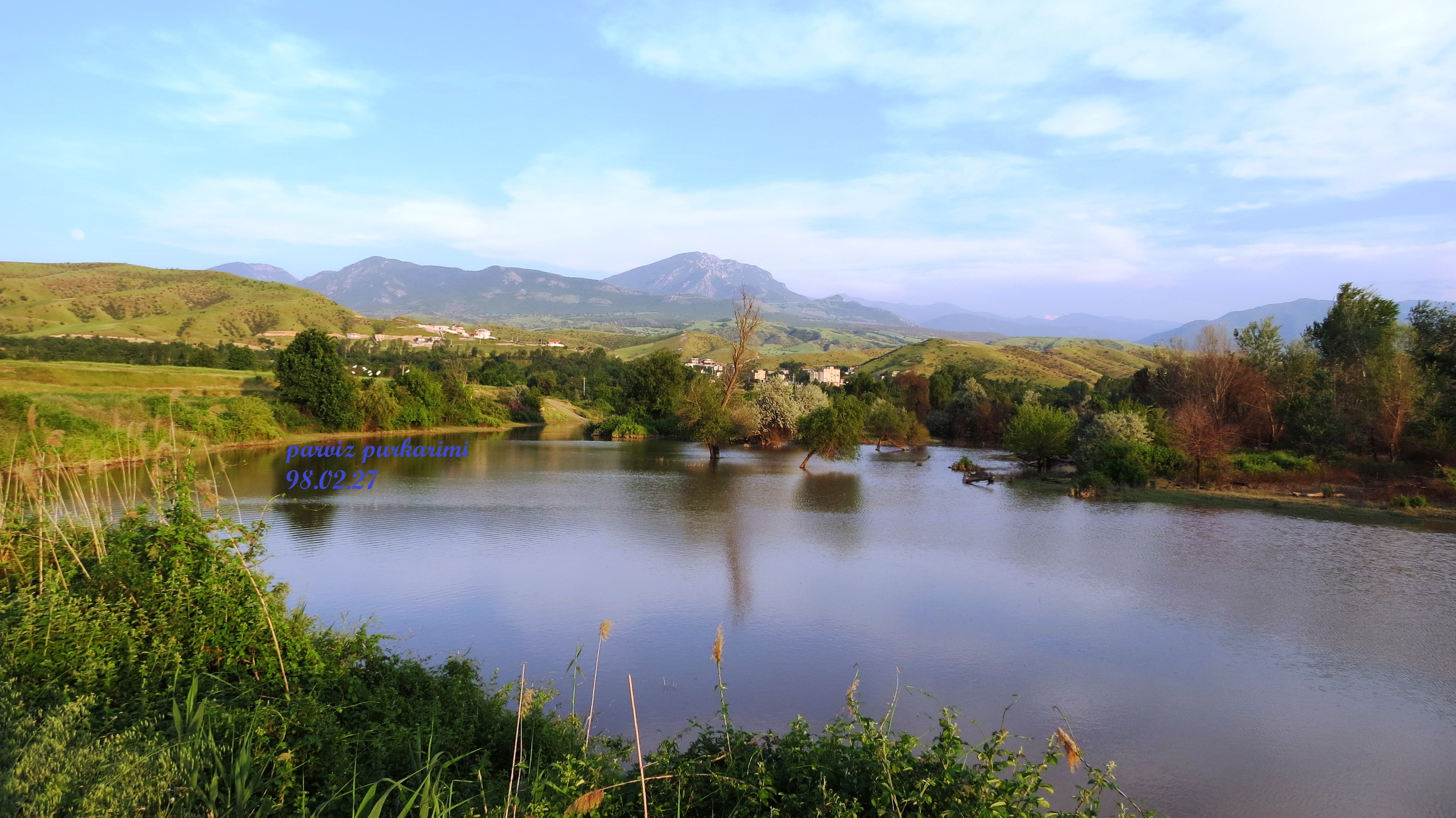 نمایی از دریاچه طبیعی و شهر عاشقلو